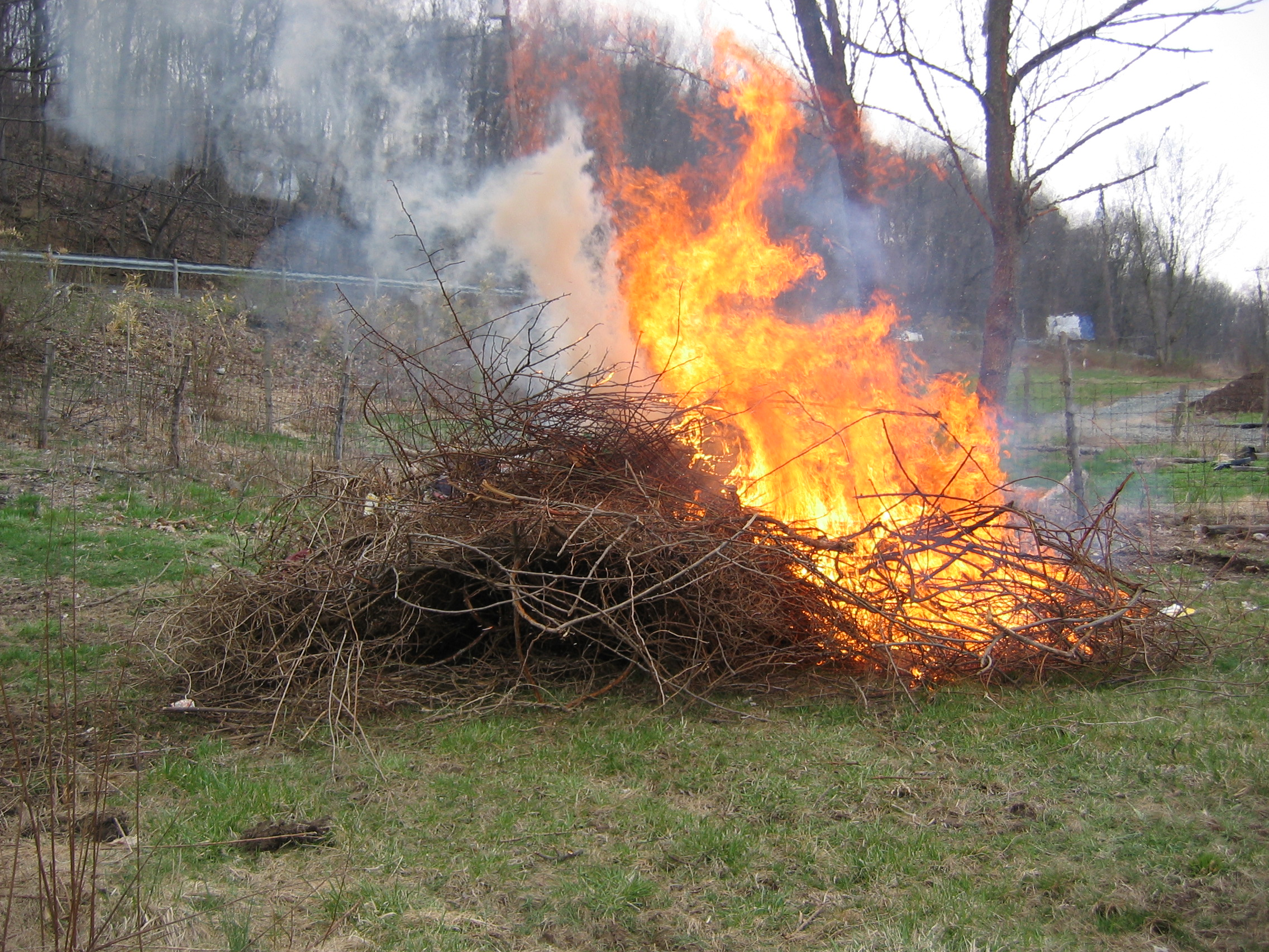 An agricultural burning pile of Rosa multiflora